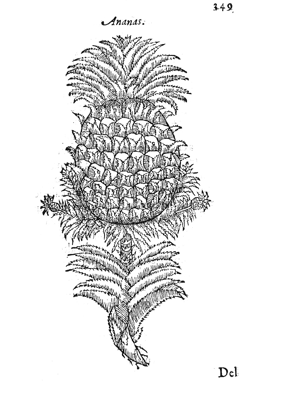 Ananas in einer Darstellung von 1578 ( Acosta: Tractado de las drogas, y medicinas de las Indias Orientale)